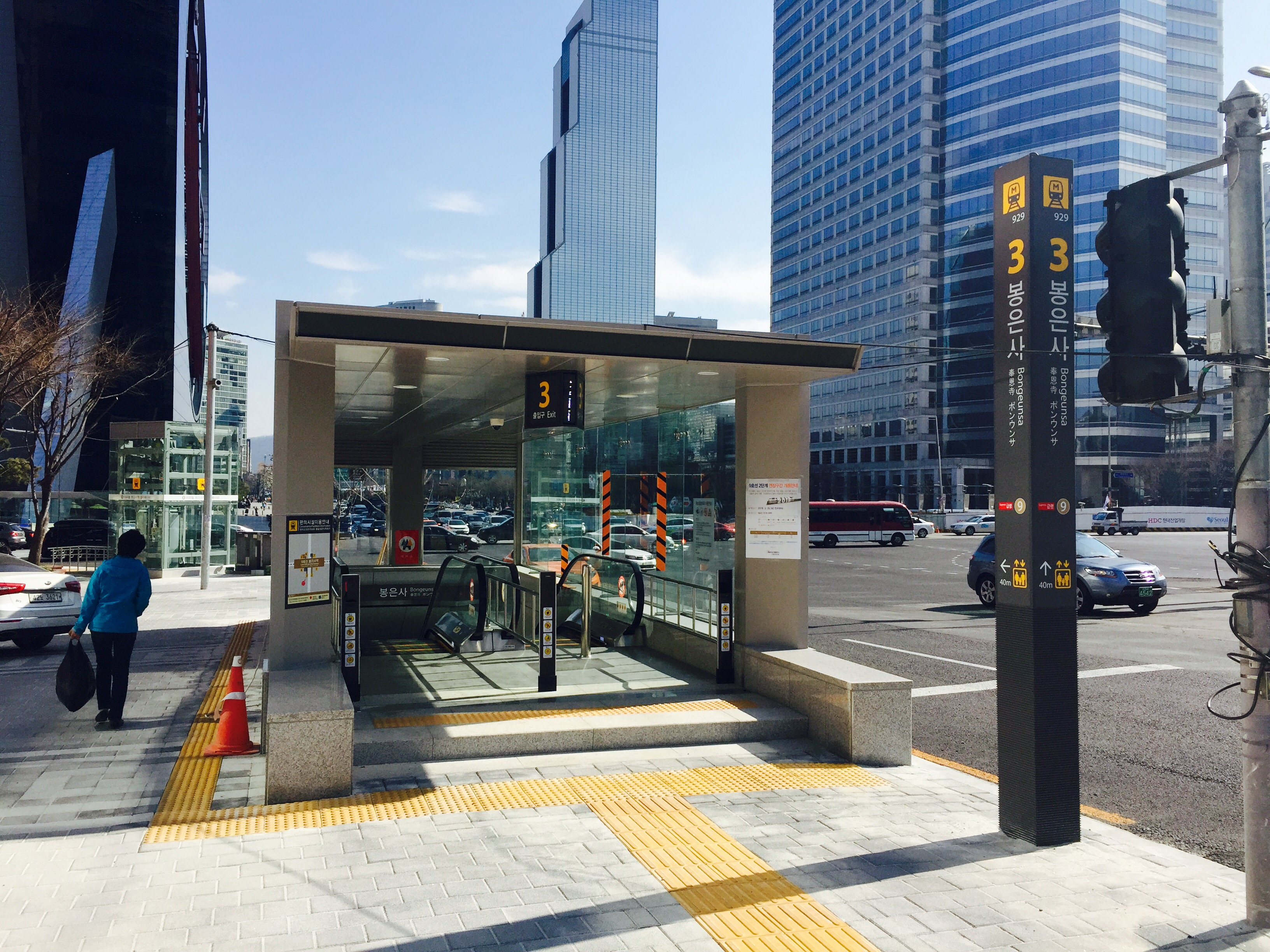 봉은사역 3번 출입구